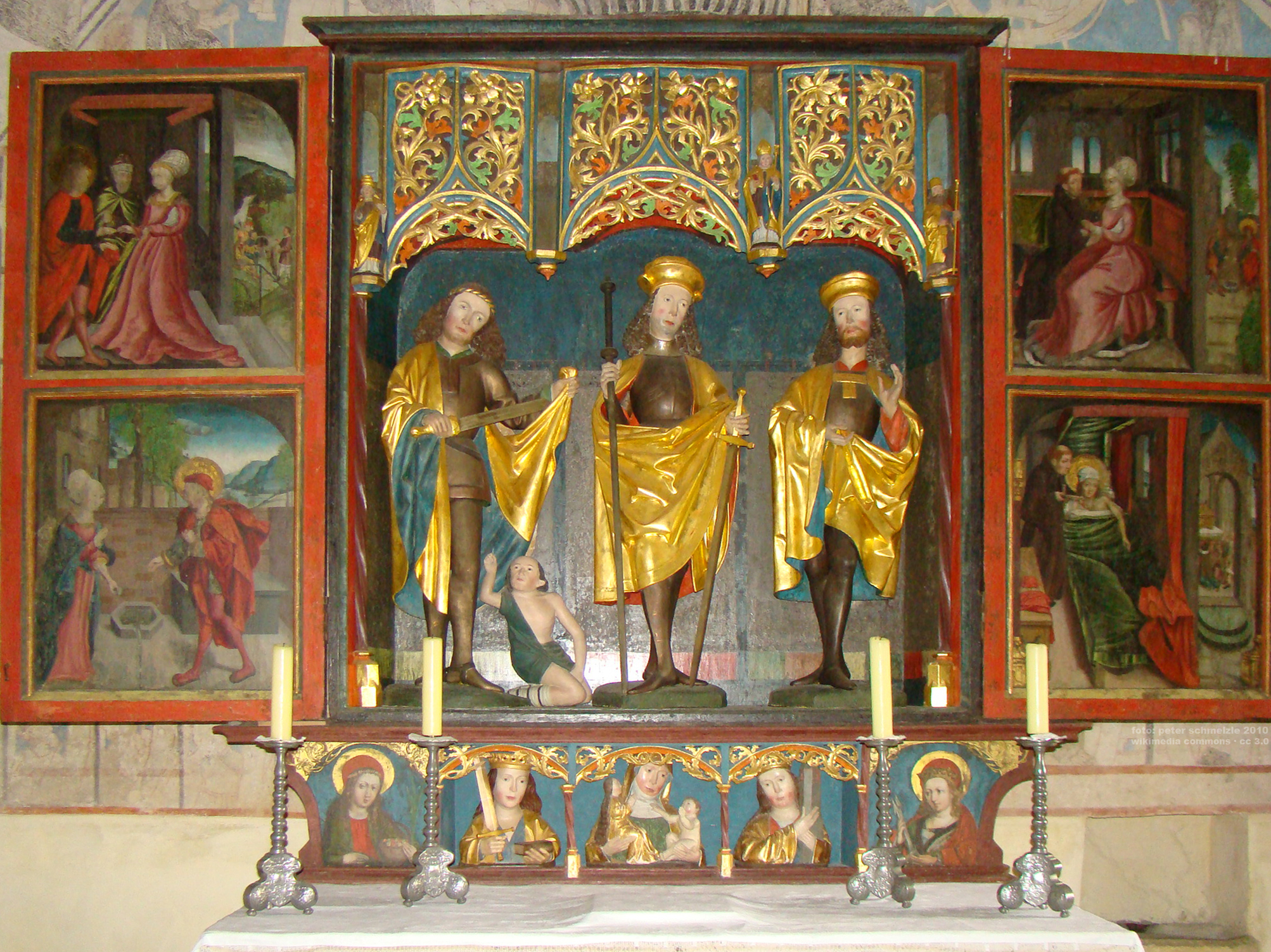 Gangolfsaltar in der Gangolfskapelle in Neudenau